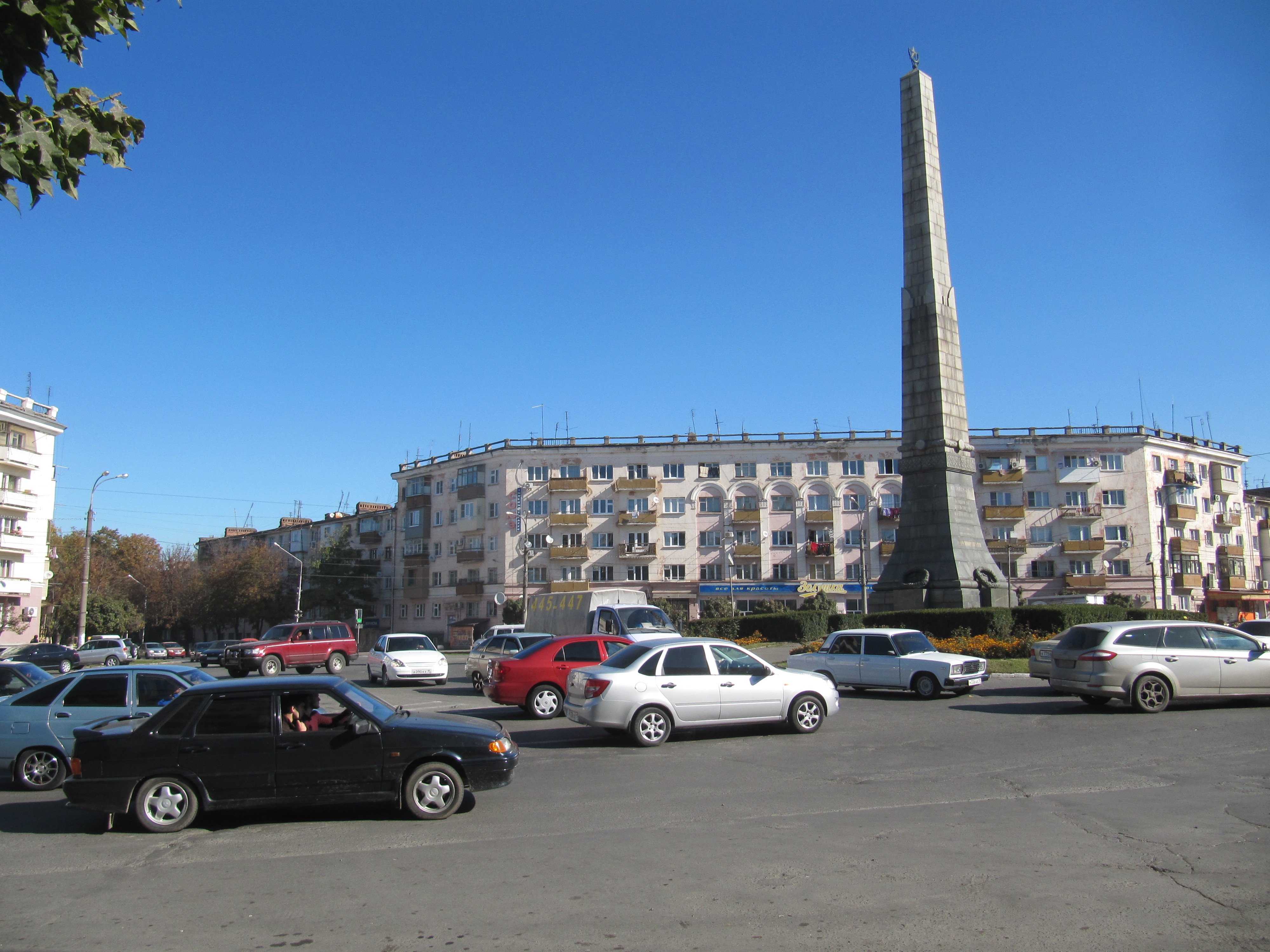 Площадь Революции, Владикавказ